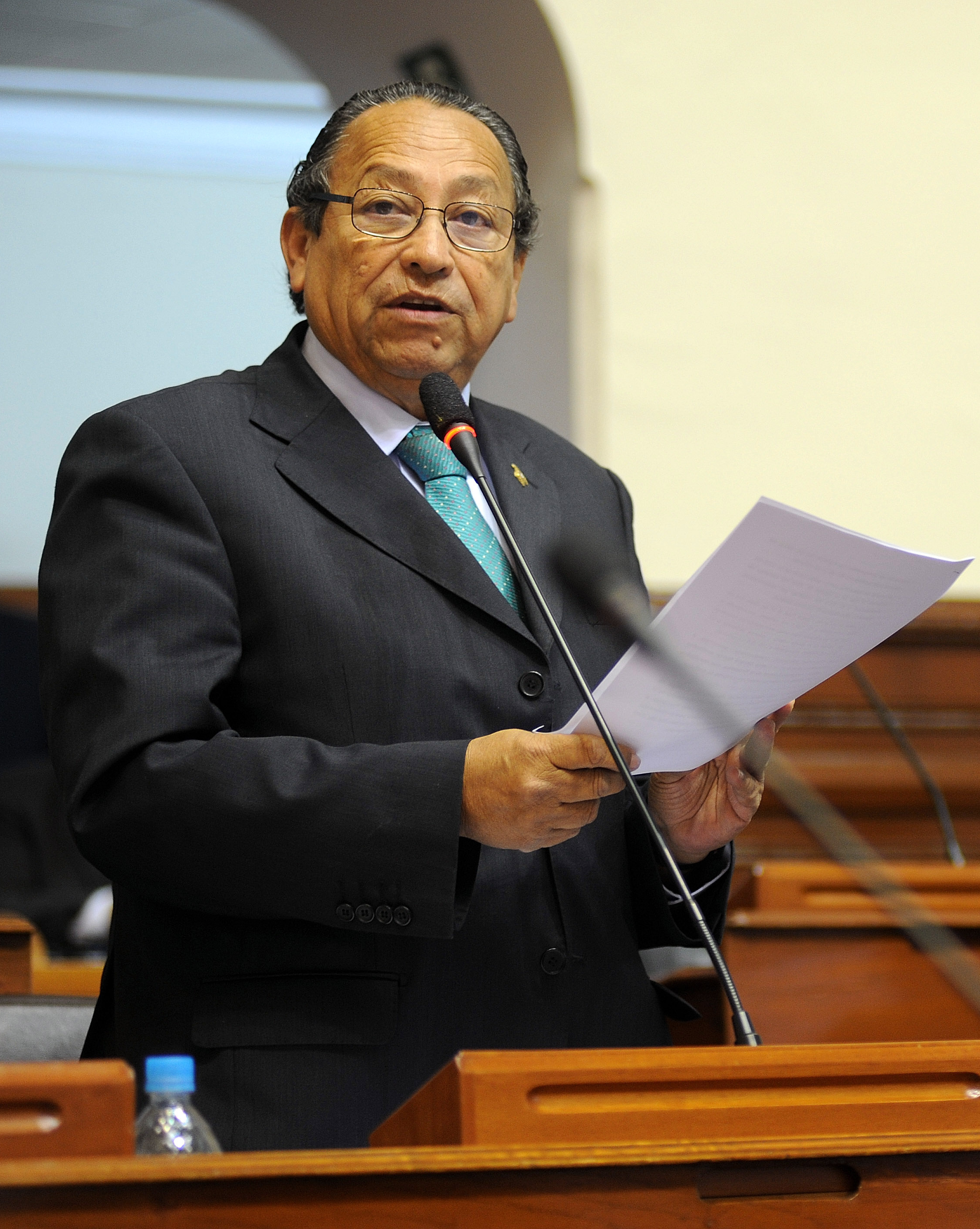 Por 63 votos a favor, 19 en contra y una abstención el Pleno del Congreso aprobó esta mañana un dictamen respecto de la Cuenta General de la República correspondiente al Ejercicio Fiscal 2009. El dictamen fue sustentado por el congresista José Carrasco Távara, presidente de la Comisión de Presupuesto.